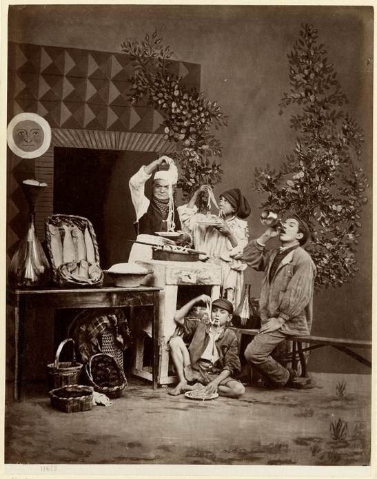 Giorgio Sommer (1834-1914), Napoli. Mangiamaccheroni. Numero di catalogo: 11612.